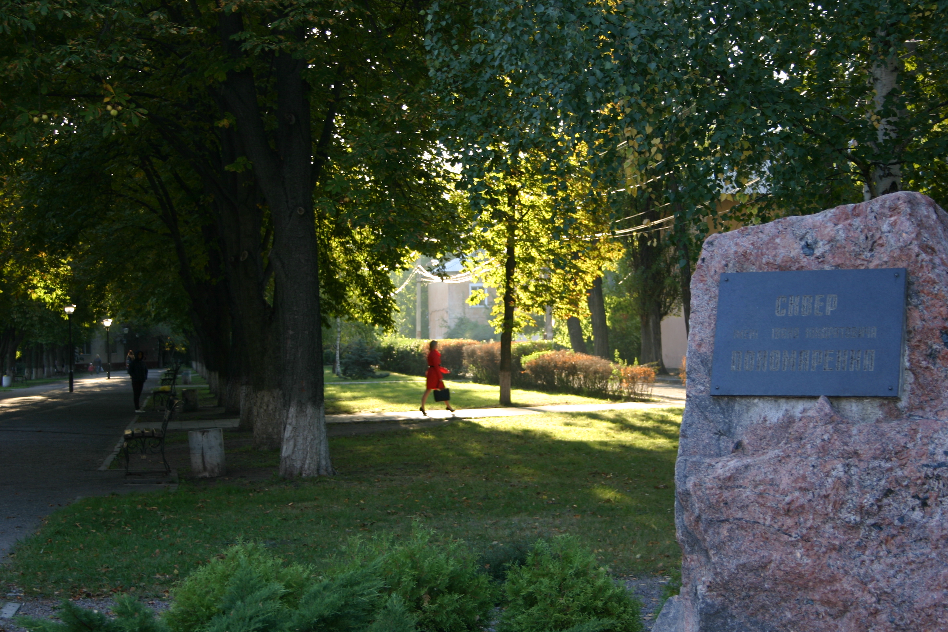 Памятный камень на аллее сквера имени Ивана Пономаренко в городе Кременчуг